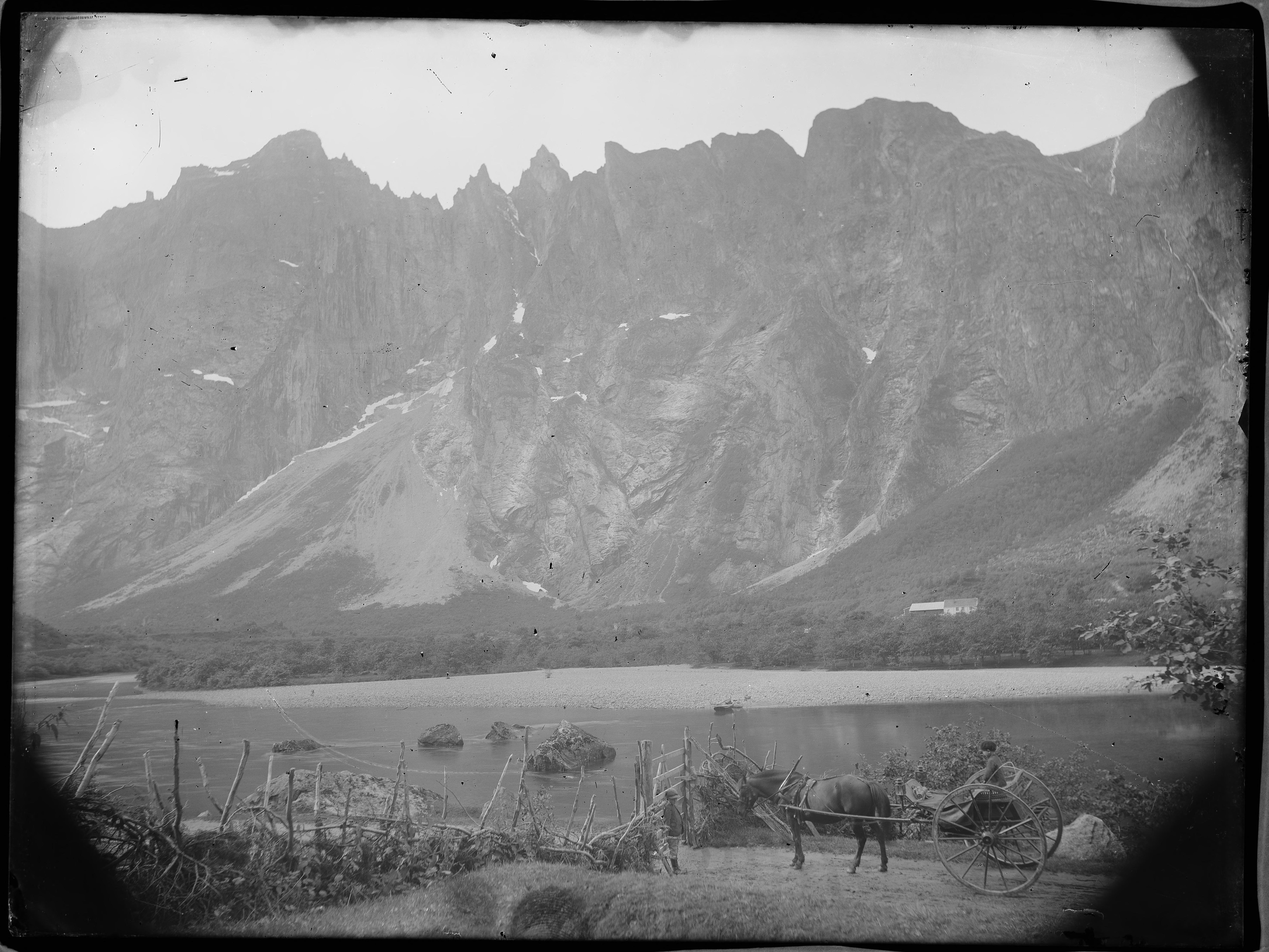 Påskrift konvolutt: Trollveggen [Riksantikvaren] Sted: Rauma,Trollveggen Kommune: Rauma Fylke: Møre og Romsdal Tagger: landskap fjellvegg elv hest og vogn